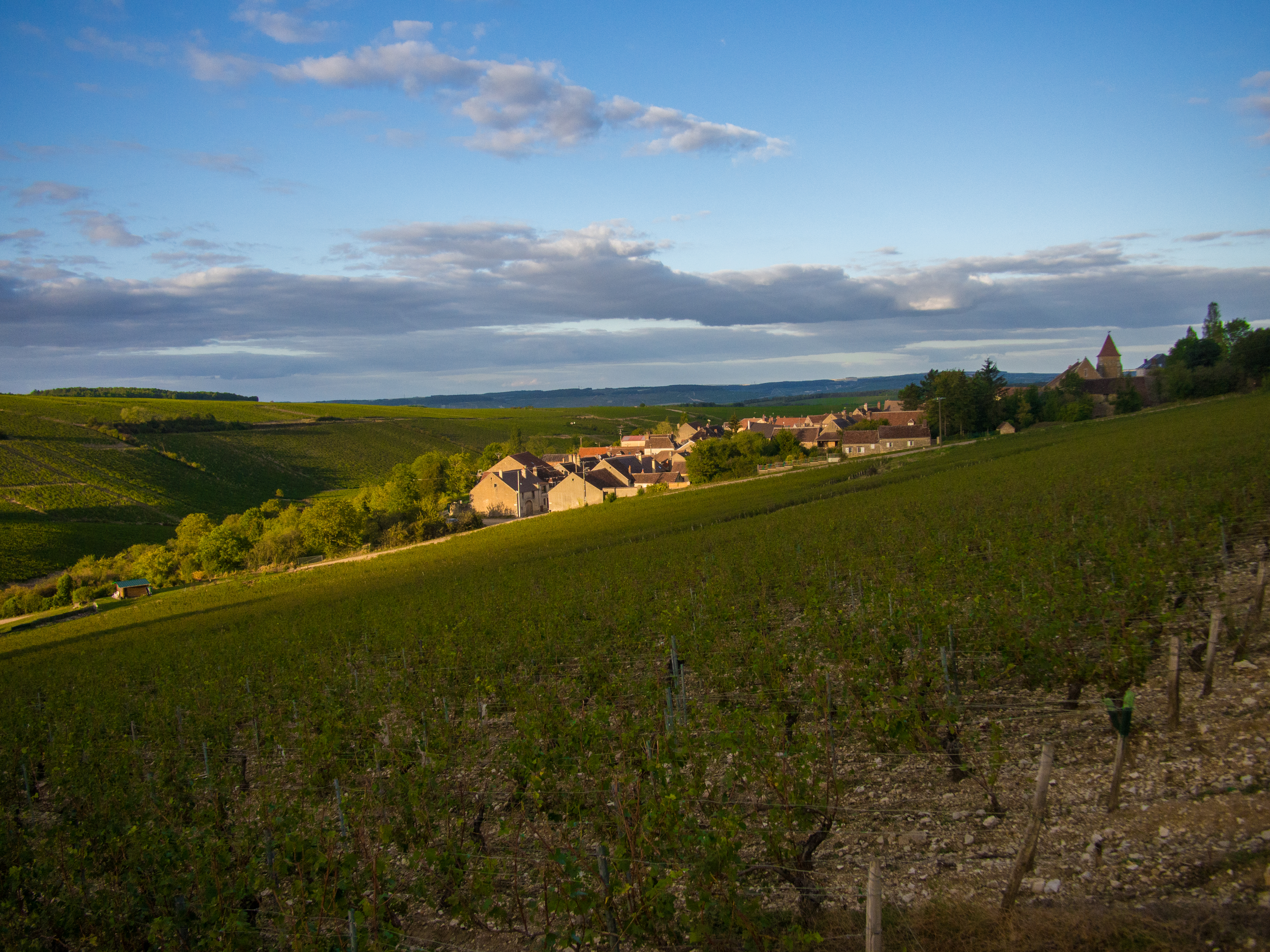 Vue du village de Courgis entouré du vignoble.